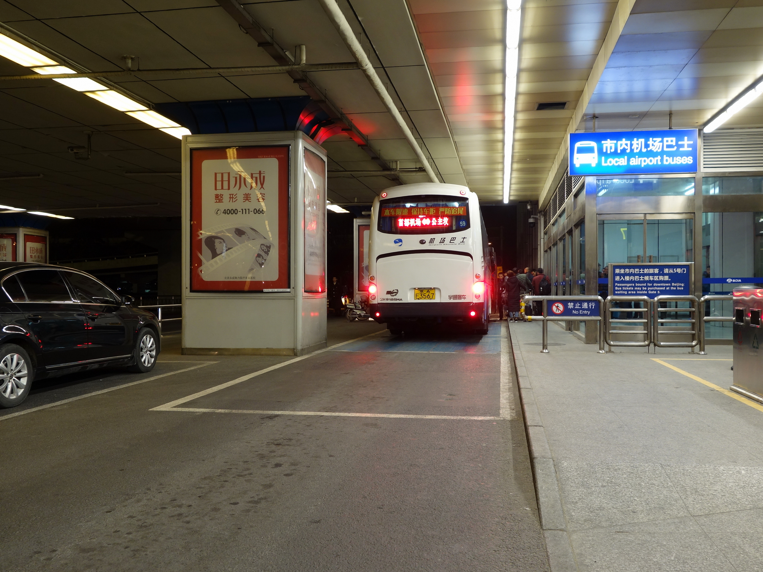 北京首都国际机场1号航站楼的市内机场巴士站